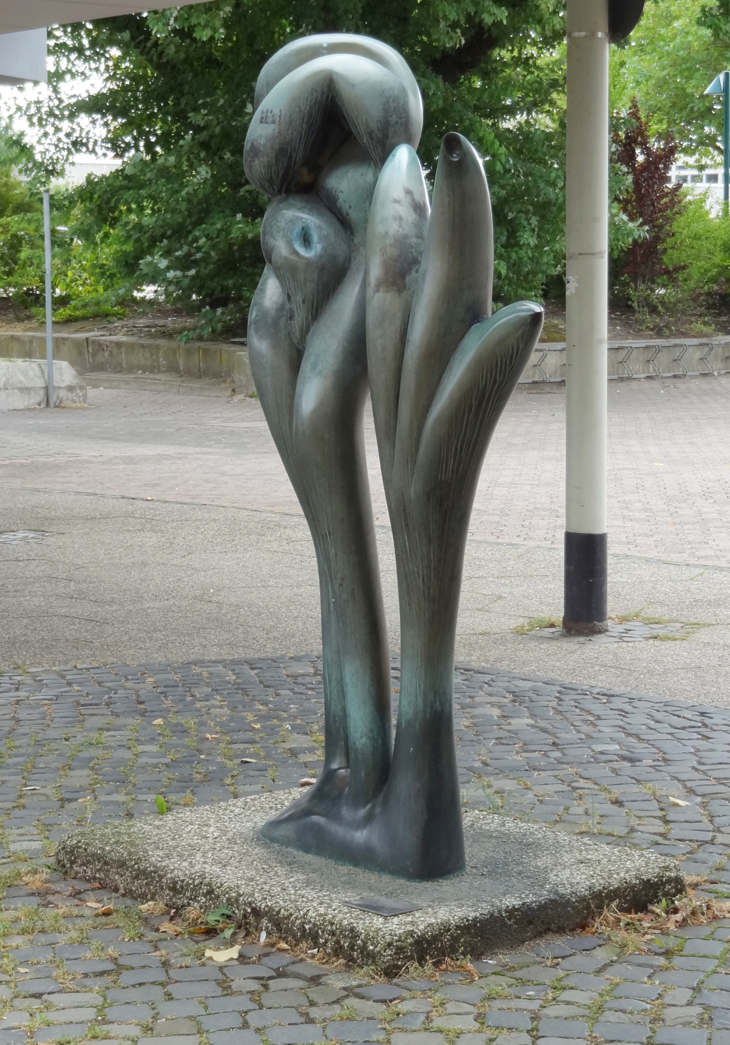 "Grosse Flora" - Juli 1970 - Emil Cimiotti